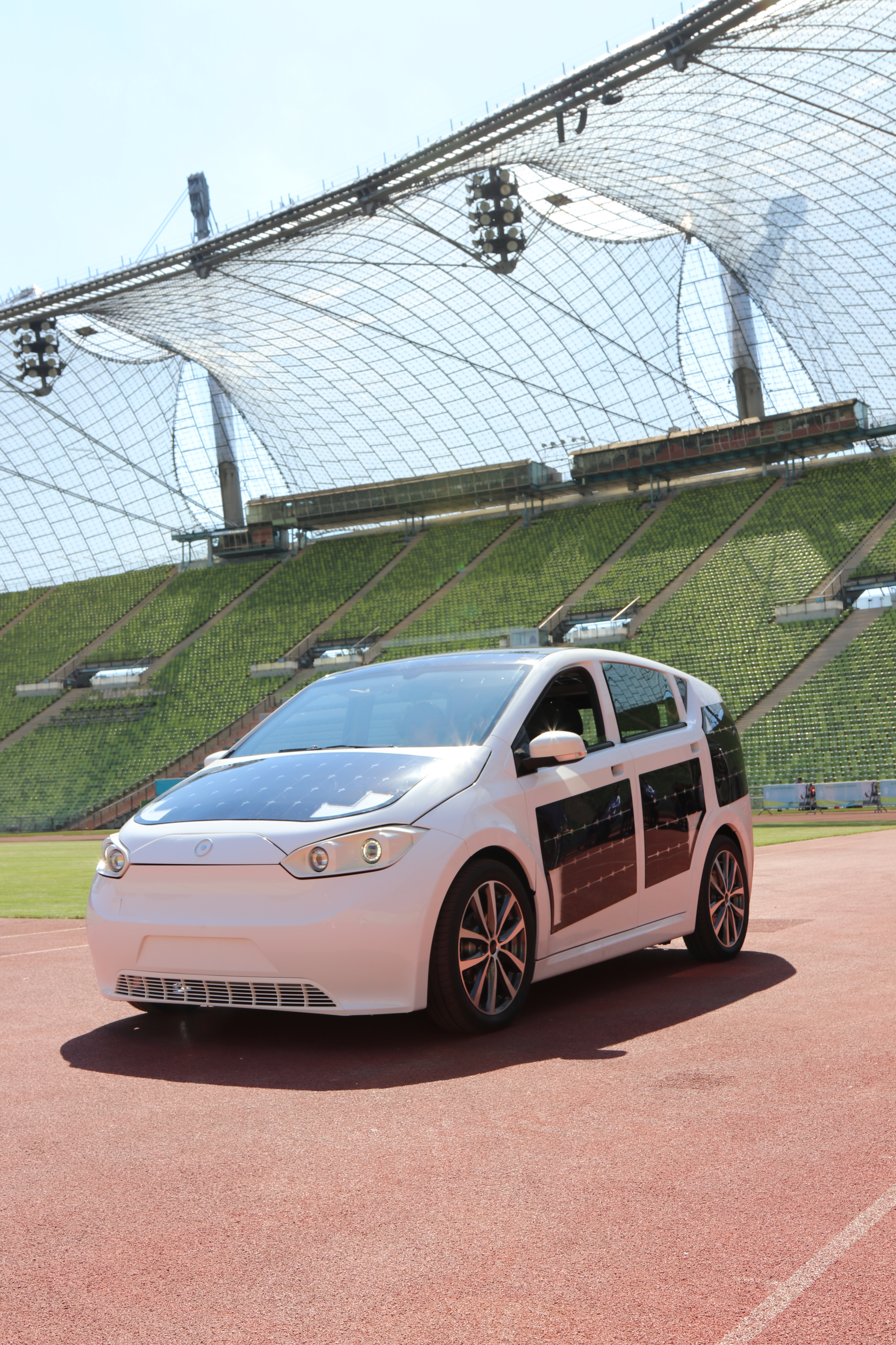 Der Sono Sion im Münchner Olympiastation